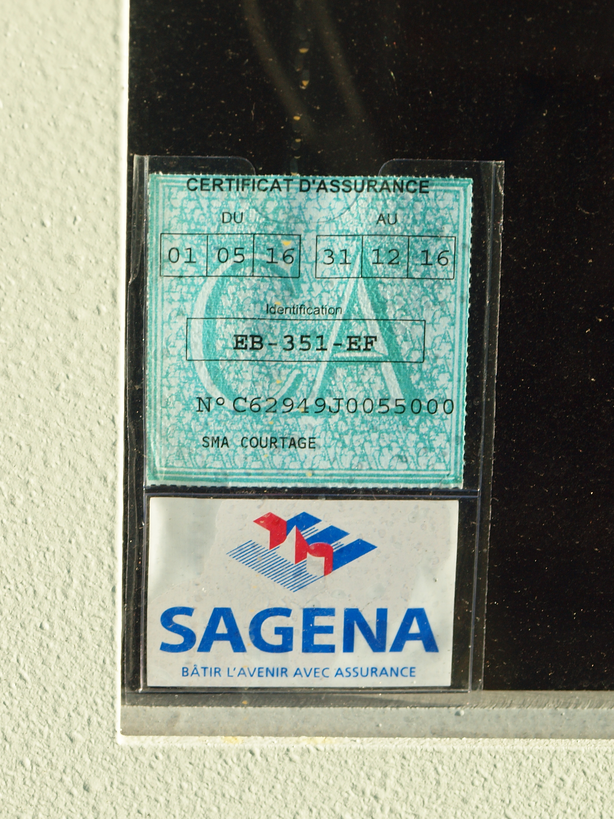 Sur un cinémomètre routier déplaçable (son certificat d'assurance affiché, comme pour une remorque de plus de 500 kg de PTAC ; 1250 kg ici, dus à 8 très lourdes batteries rechargeables pour 5 jours d'autonomie) à la sortie de Souain (Marne, France), vers Navarin.